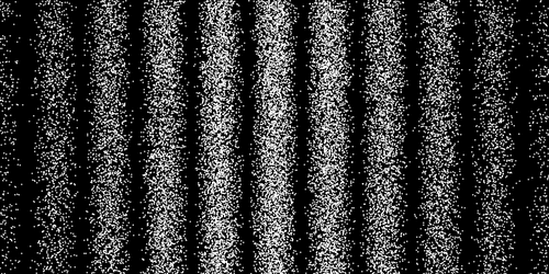 Häufigkeitsverteilung von Elektronen hinter einem Doppelspalt (Computergrafik)